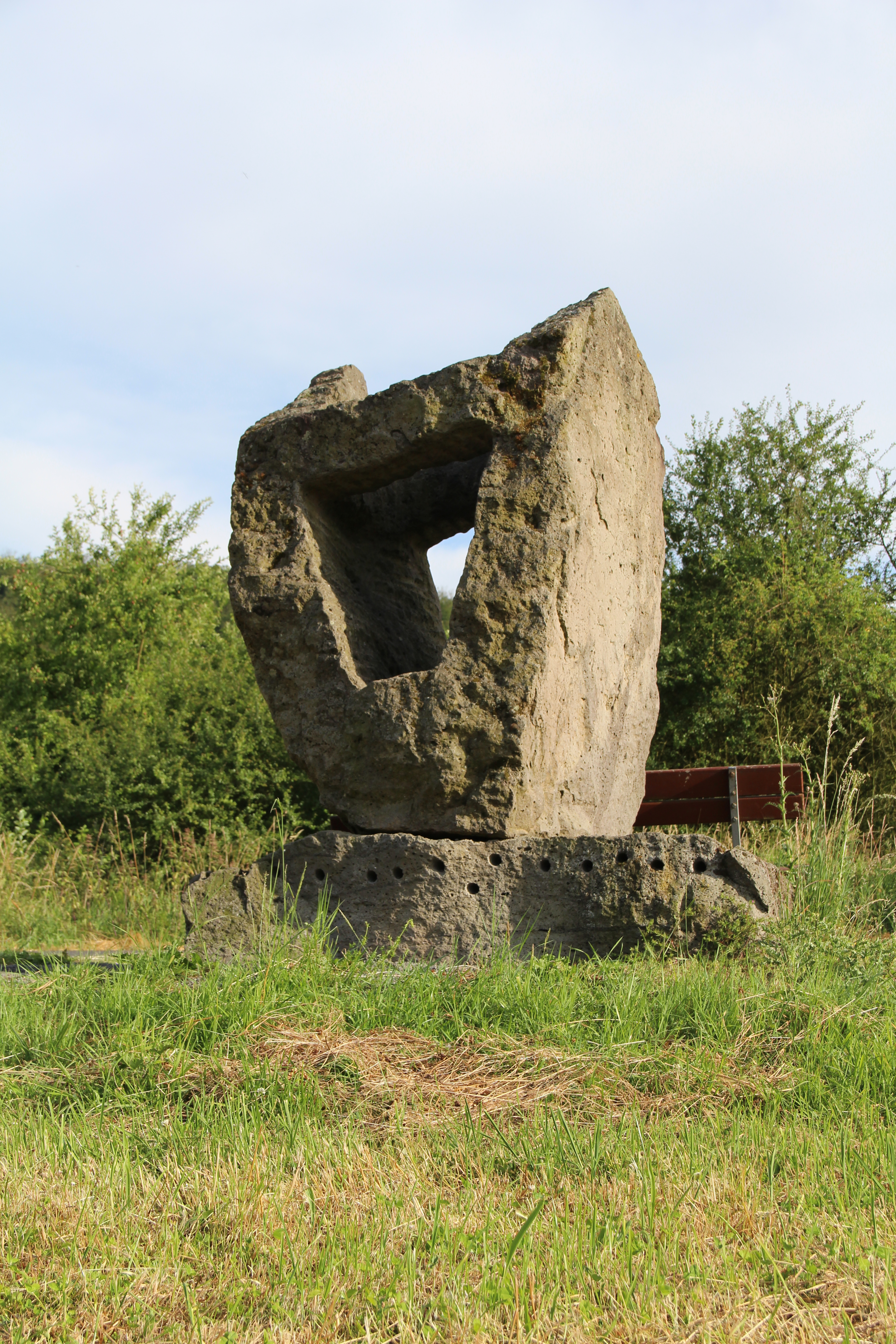 Skulptur am Radrundweg Lumda - Wieseck. Die Skulptur wurde im Rahmen des Projekts Kunst am Rad- und Wanderweg aufgestellt.